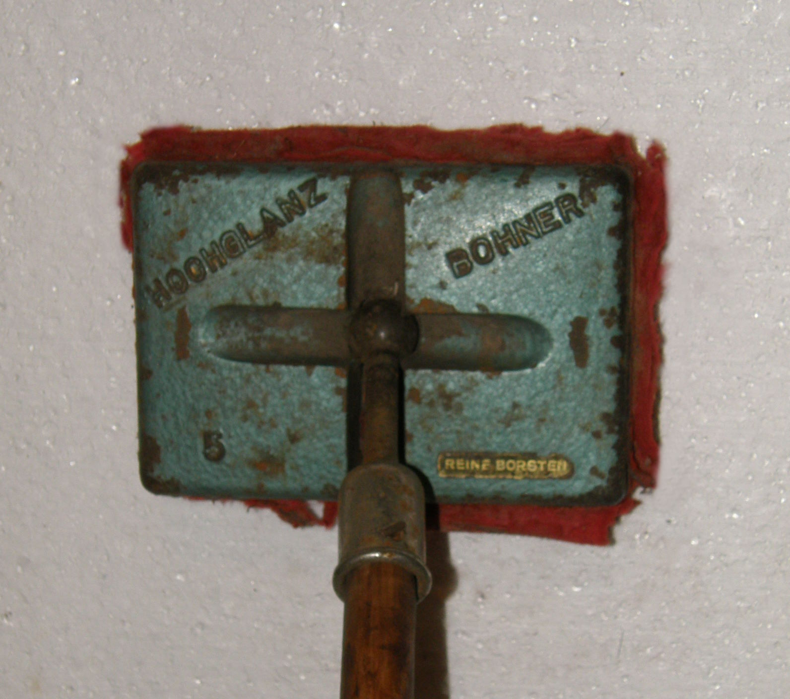 Alter gebrauchter Bohnerbesen oder auch Blocker genannt, zum Bohnern der gewachstenHolzböden